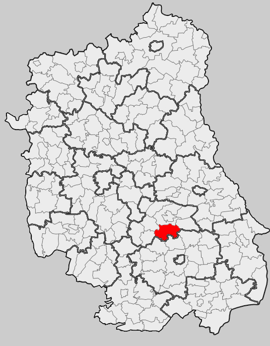 Map of gmina Izbica, Krasnystaw county, Lublin voivodship Mapa gminy Izbica, powiat krasnostawski, województwo lubelskie